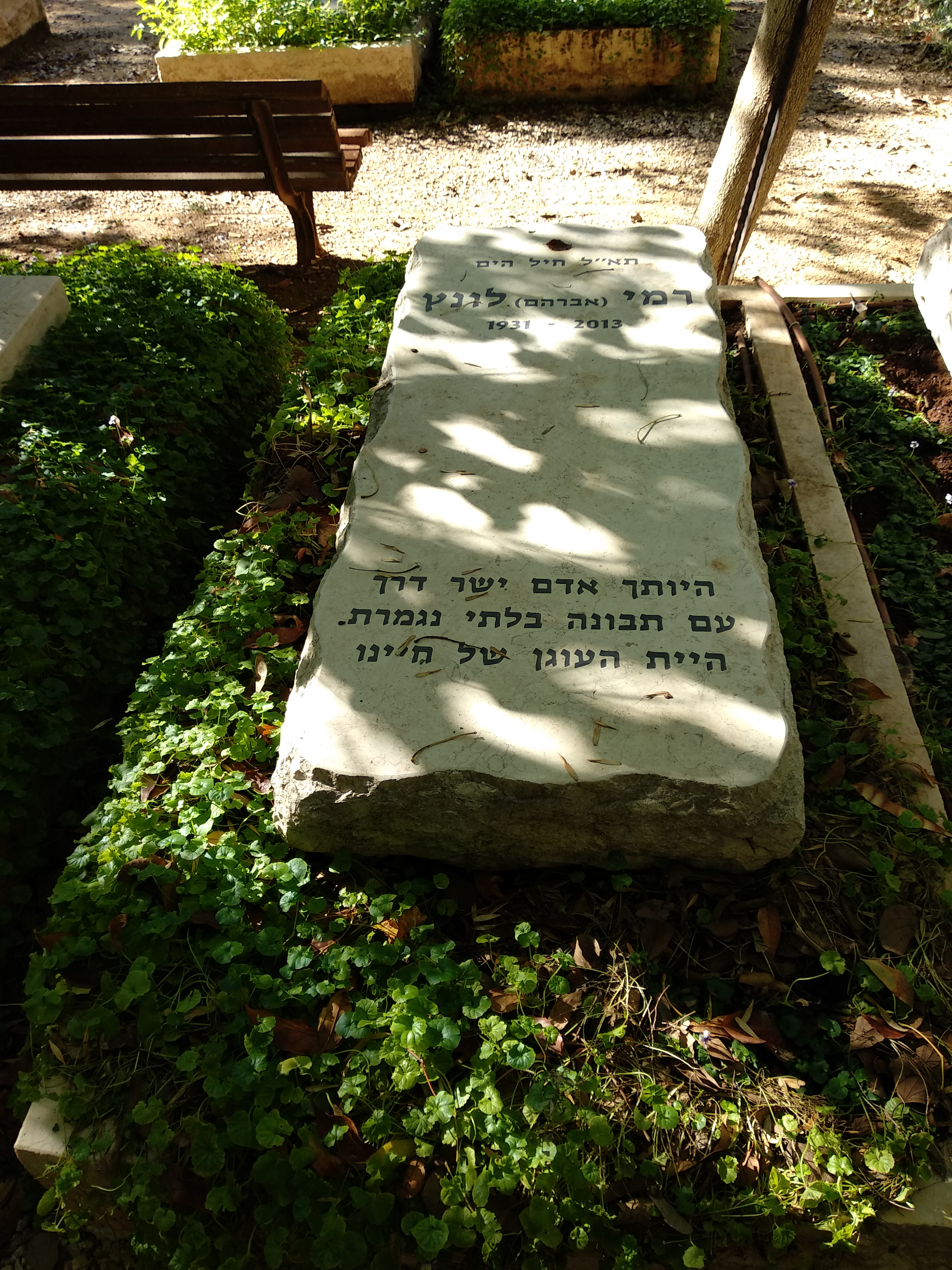 קברו של רמי לונץ בבית הקברות גבעת השלושה